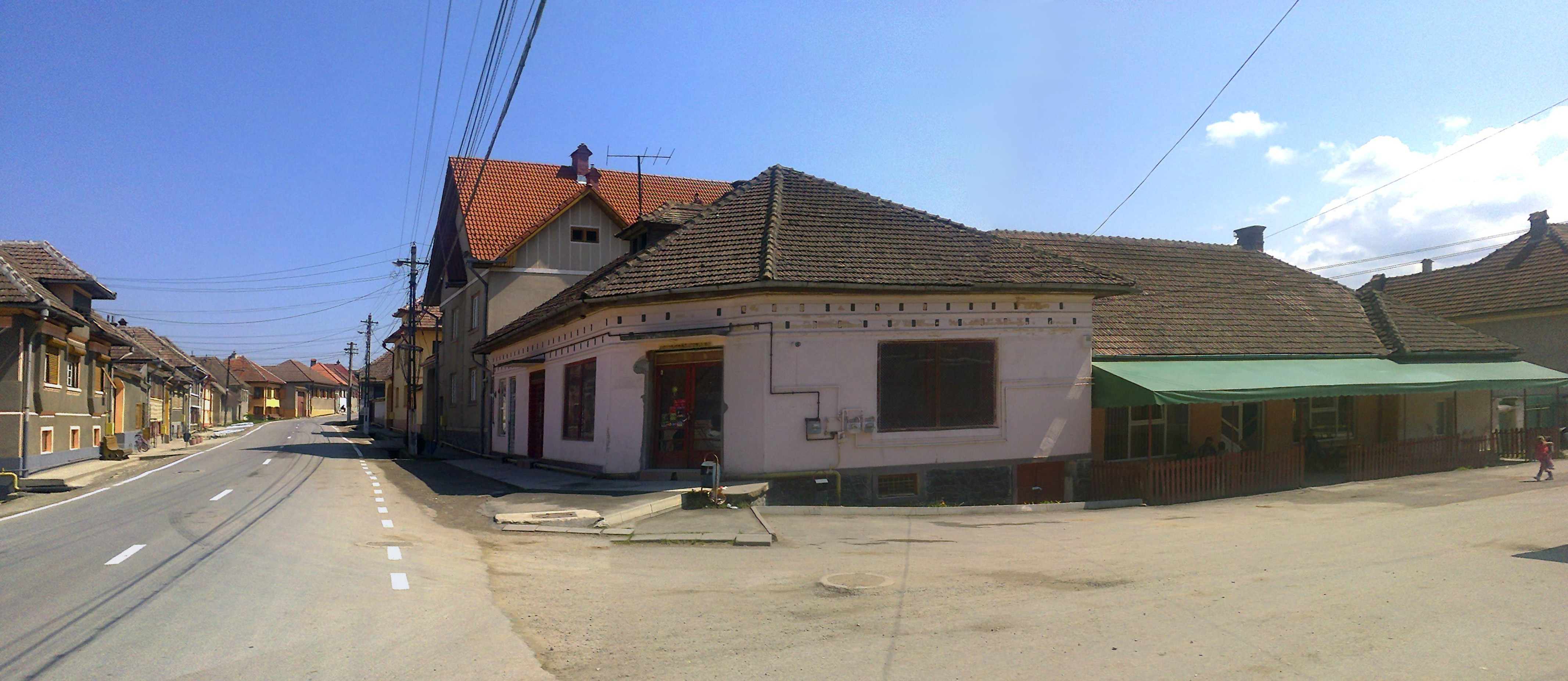 Magazinul si Restaurantul central din Racovita, Sibiu.